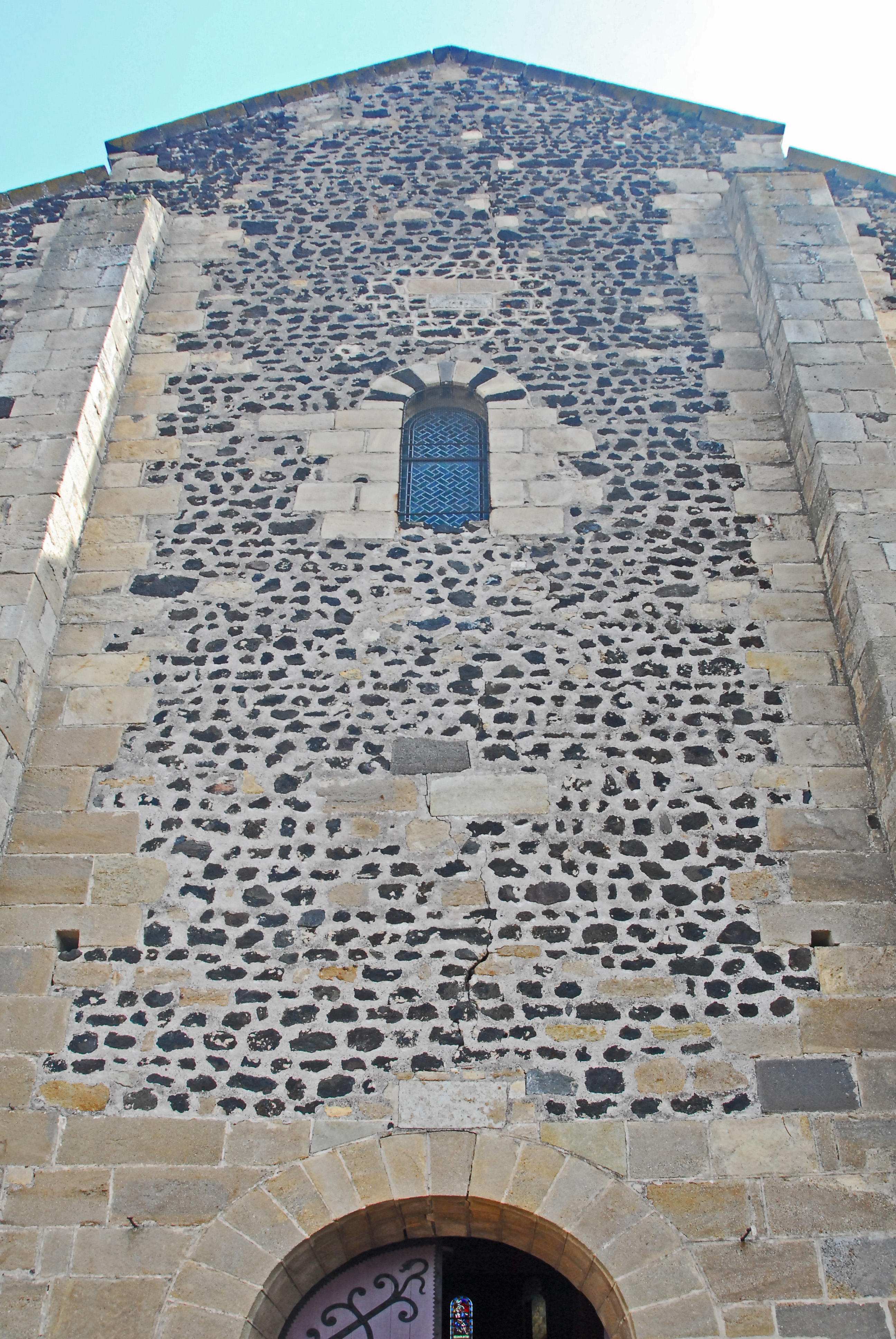 St-Saturnin Puy-de-Dôme), Fassade von W